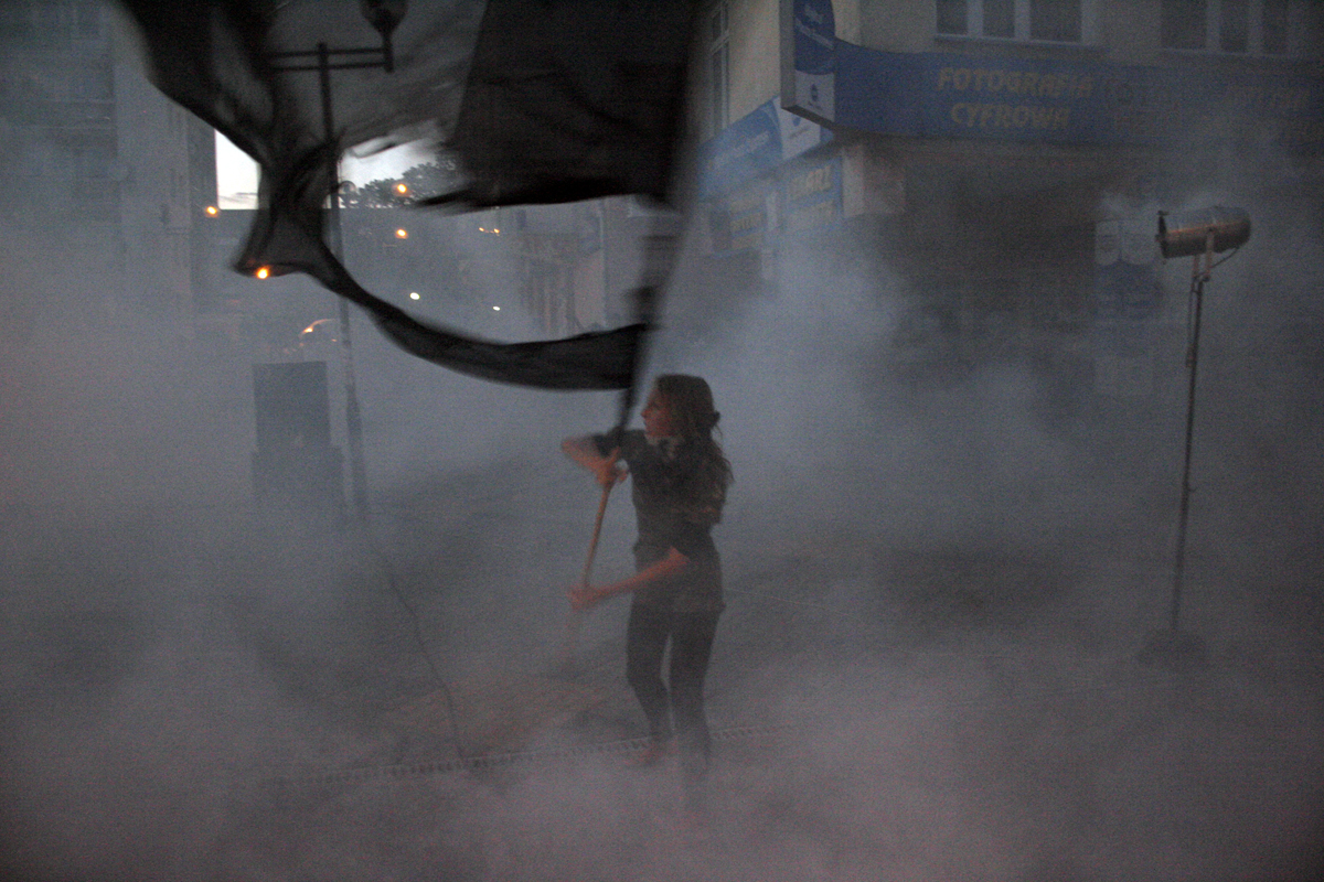 Spektakl "Szelestnica" Teatru Terminus a quo z Nowej Soli.